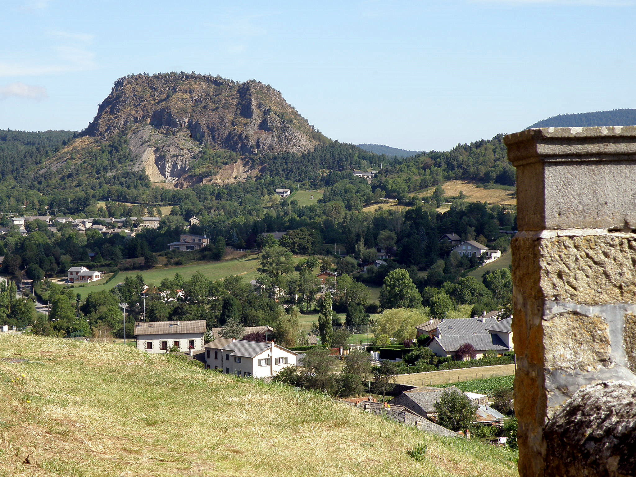 Saint-Julien-Chapteuil, comm. du dép. de la Haute-Loire, France (région Auvergne). Prise de vue au téléobjectif, en direction du nord, depuis le terre-plein, visible à l'avant-plan, sis derrière le chevet de l'église Saint-Julien. Les maisons au second plan se situent dans le nord du bourg-centre de Saint-Julien-Chapteuil. Le groupe de maisons que l'on aperçoit plus loin, contre le bord gauche de la photo, est le hameau de Monac (comm. de Saint-Pierre-Eynac). Le morne rocheux à l'arrière-plan est le suc de Monac (alt. 1022m, également situé dans la comm. de Saint-Pierre-Eynac).